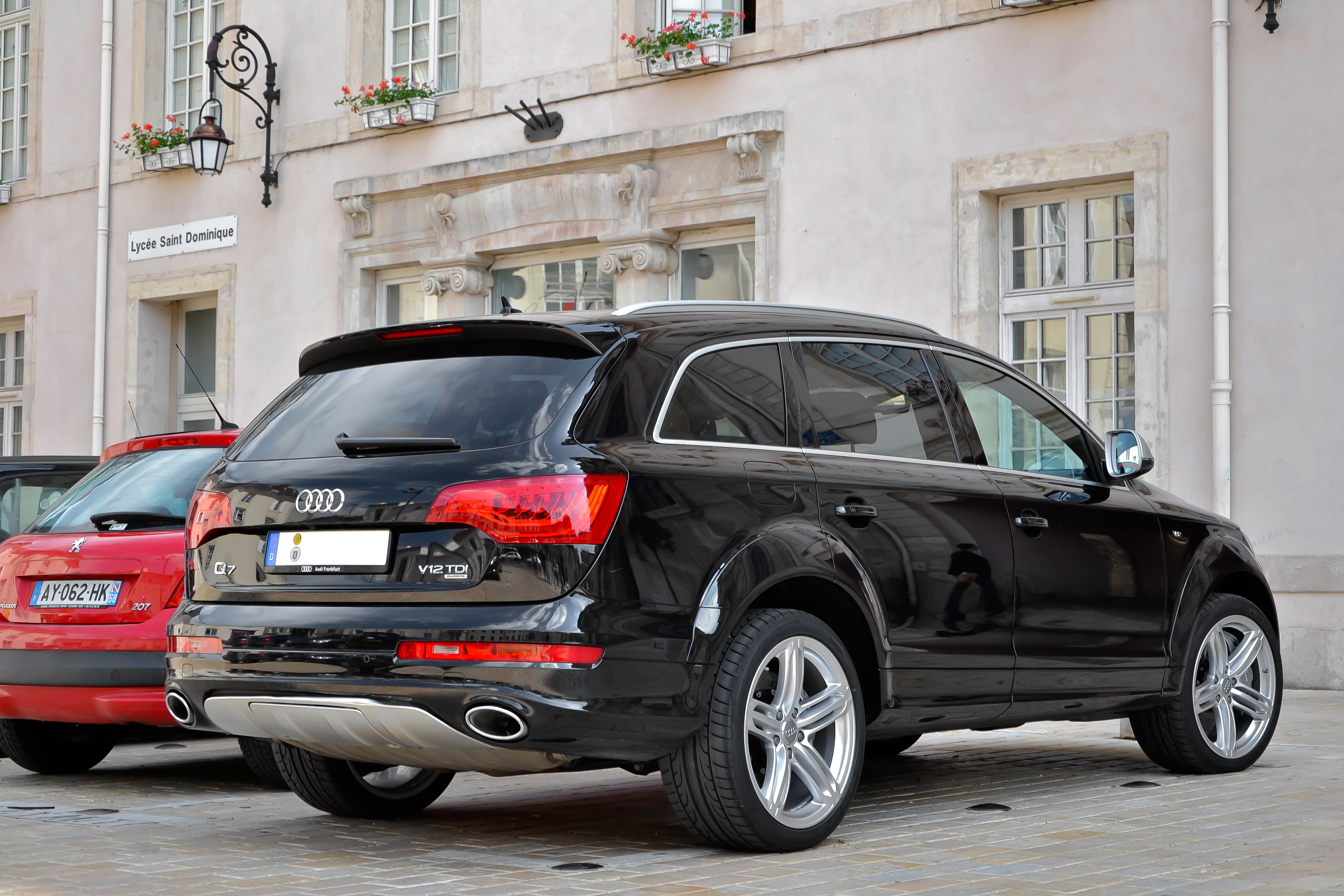 Audi Q7 V12